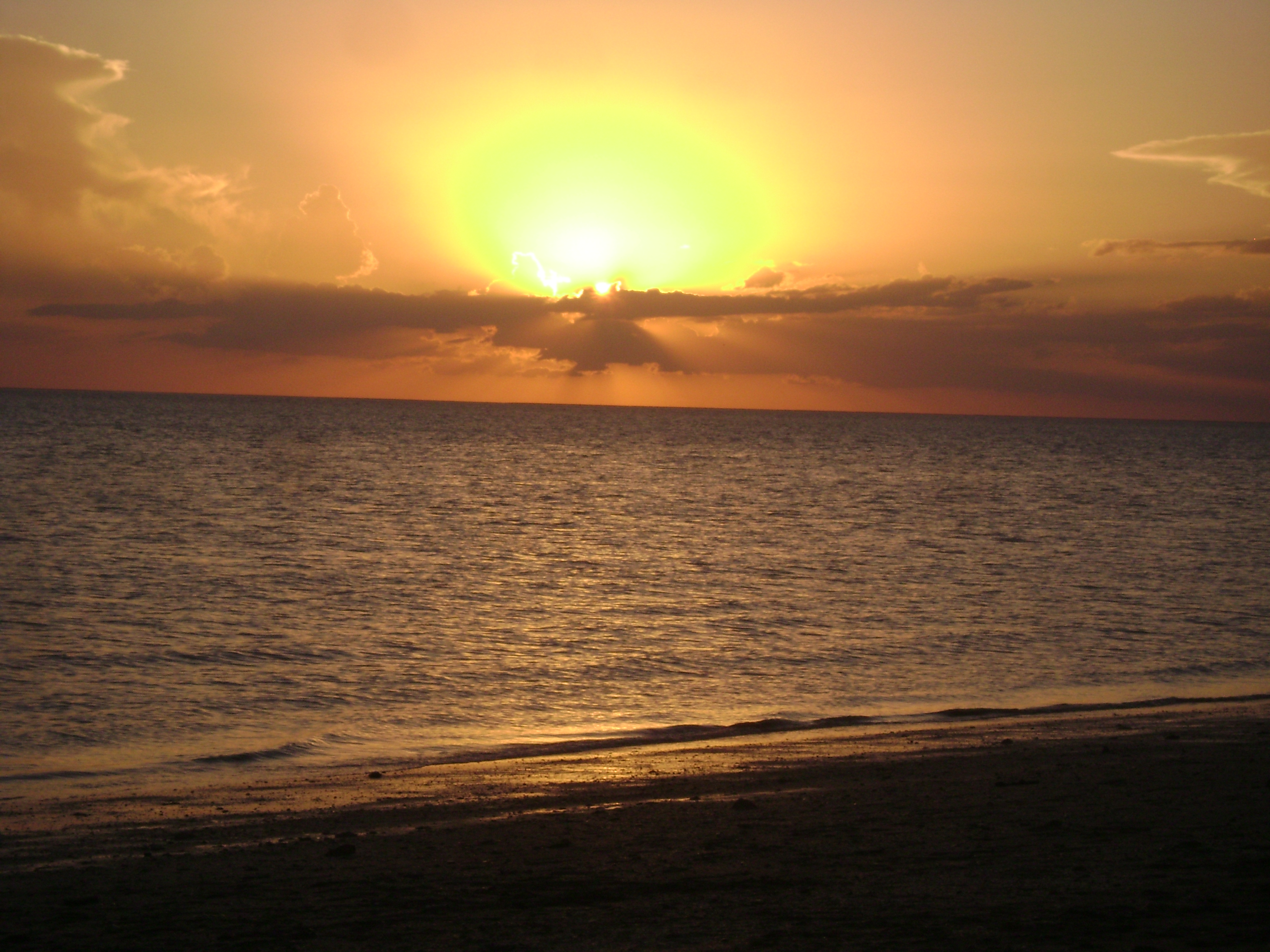 Atardecer en Punta Ancla, Punta Alta, Provincia de Buenos Aires, Argentina.